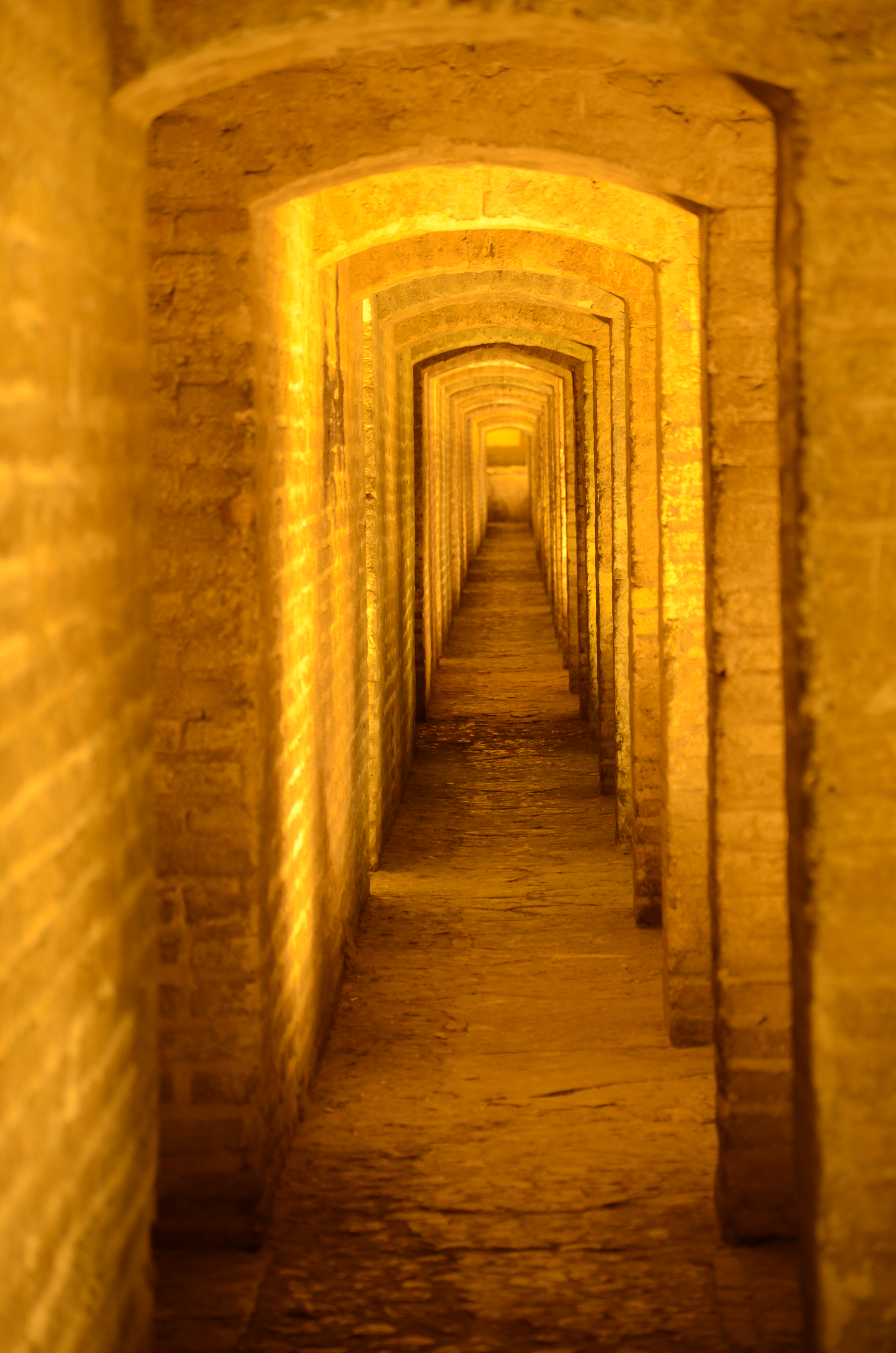 Isfahan - 33 pol - Siyosepol